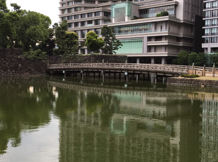 日本に存在する橋。